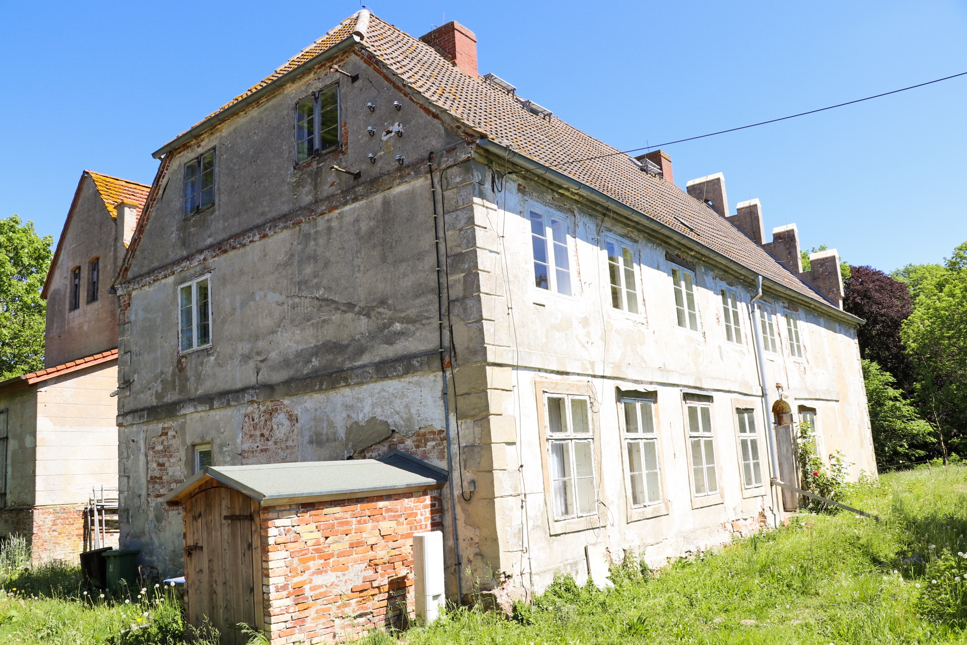 Ralow 2017 von Südwesten